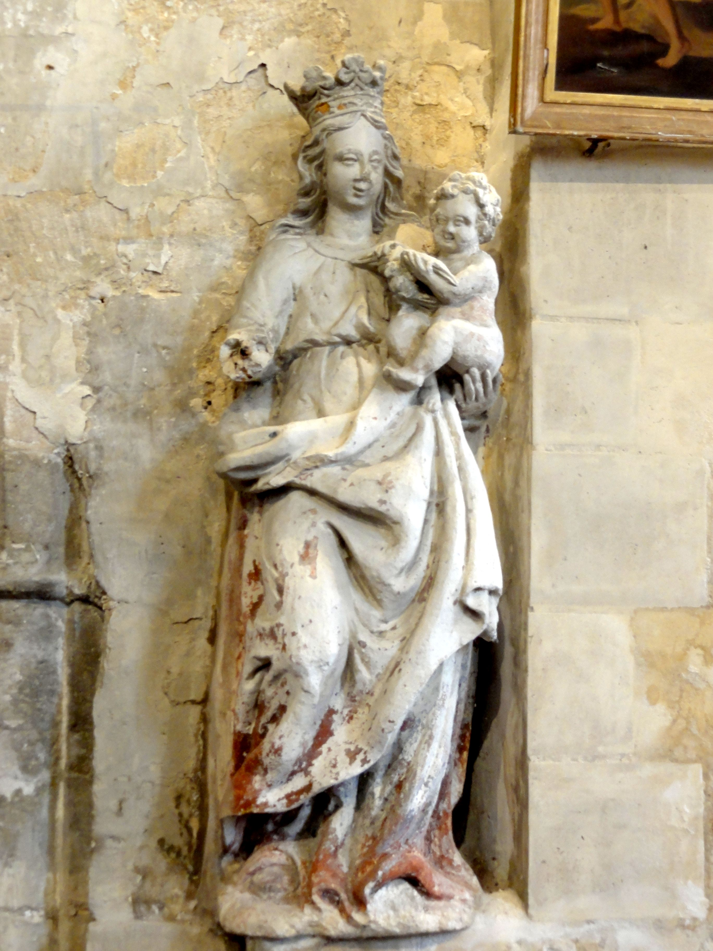 Vierge à l'Enfant.